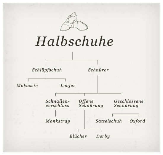 Übersicht der verschiedenen Halbschuh-Typen